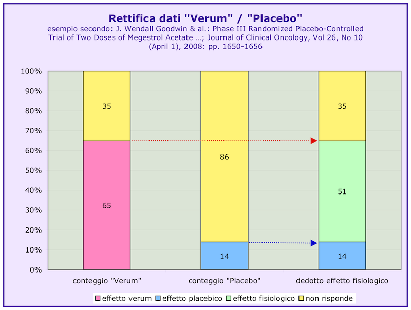 medicina popolare, placebo, placebico, effetto, misurato, rettificato, verum, fisiologico